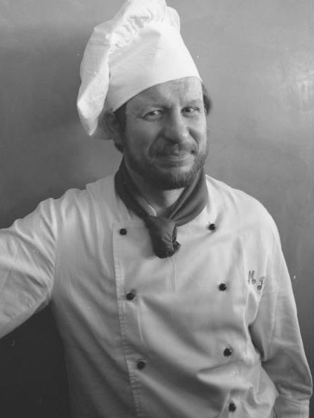 Juni 1988 Bonn: Neueröffnung einer Gaststätte